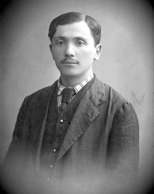 תצלום דיוקנו של גרשון שופמן: הדפס שחור לבן, מודבק על גבי כרטיס בגודל 8X13.5 ס"מ. תחת התצלום ובגב הכרטיס, נדפסו פרטי הצלם אשר הפיק דיוקן זה בעיר לבוב (למברג). בגב הכרטיס, נוספה הקדשה בכתב ידו של שופמן אל ש. סירטה מיום 18 באוגוסט 1909. יש להניח כי תצלום זה הופק באותה שנה.